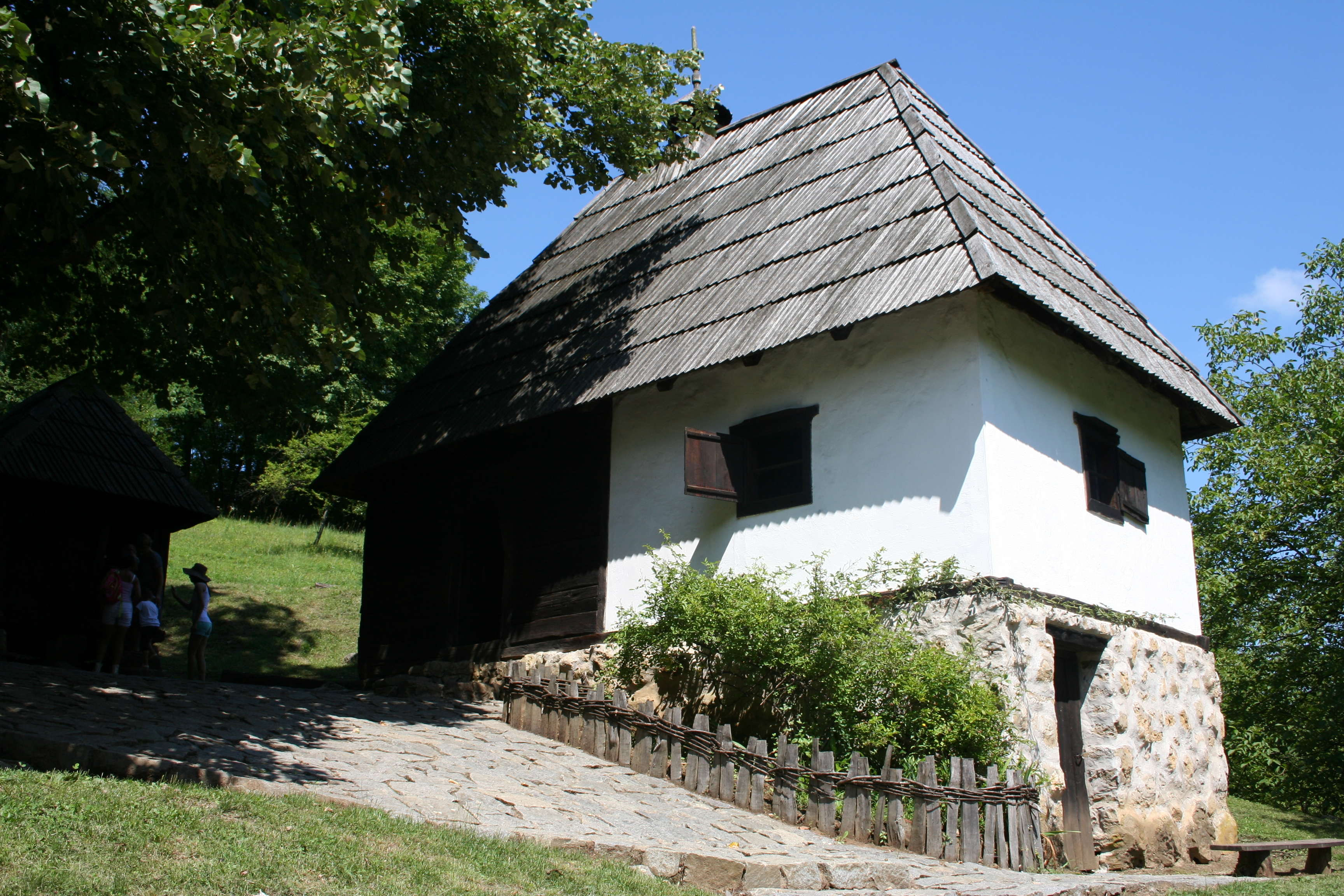 Spomen kuća Vuka Karadžića, Tršić